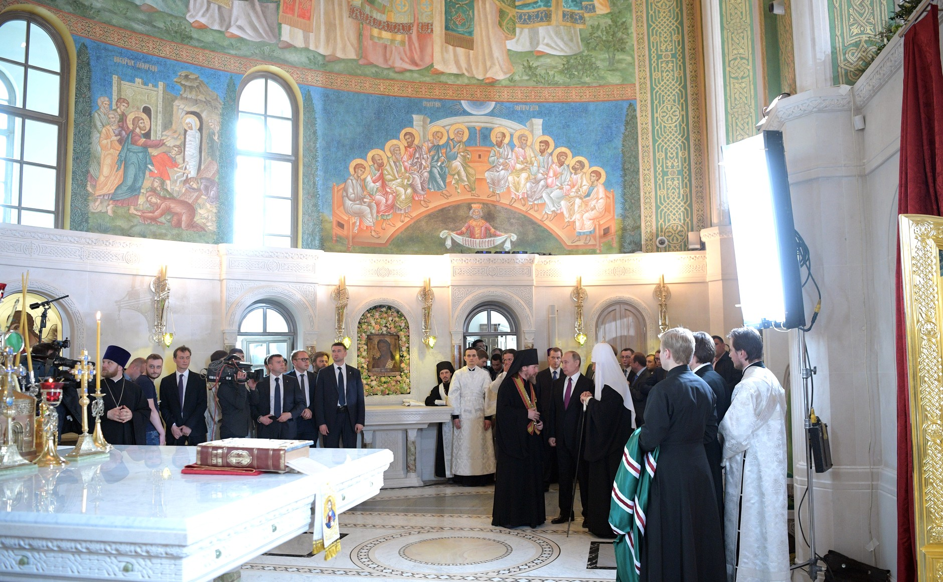 В ходе посещения московского Сретенского монастыря